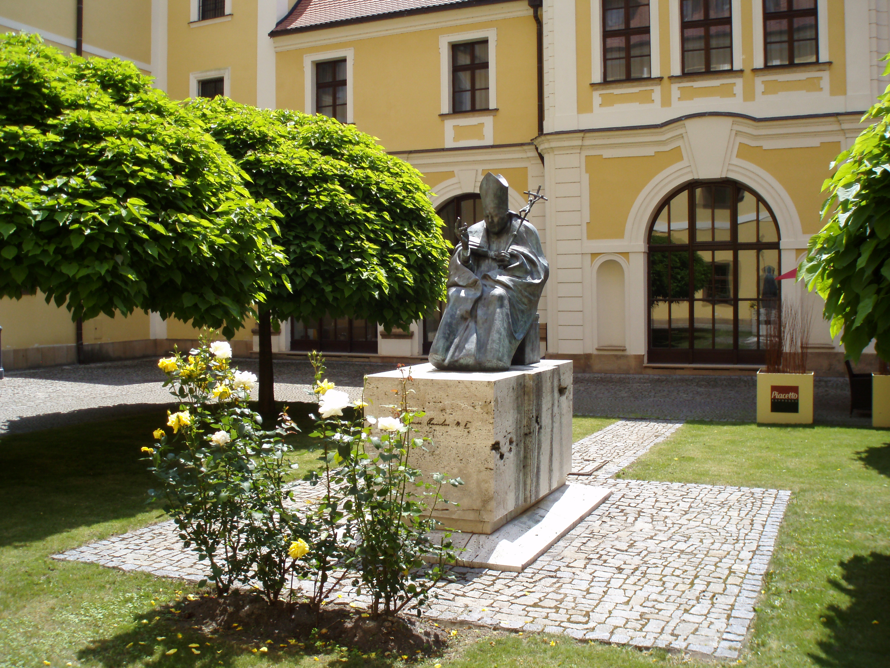 Památník papeže Jana Pavla II. v Hradci Králové